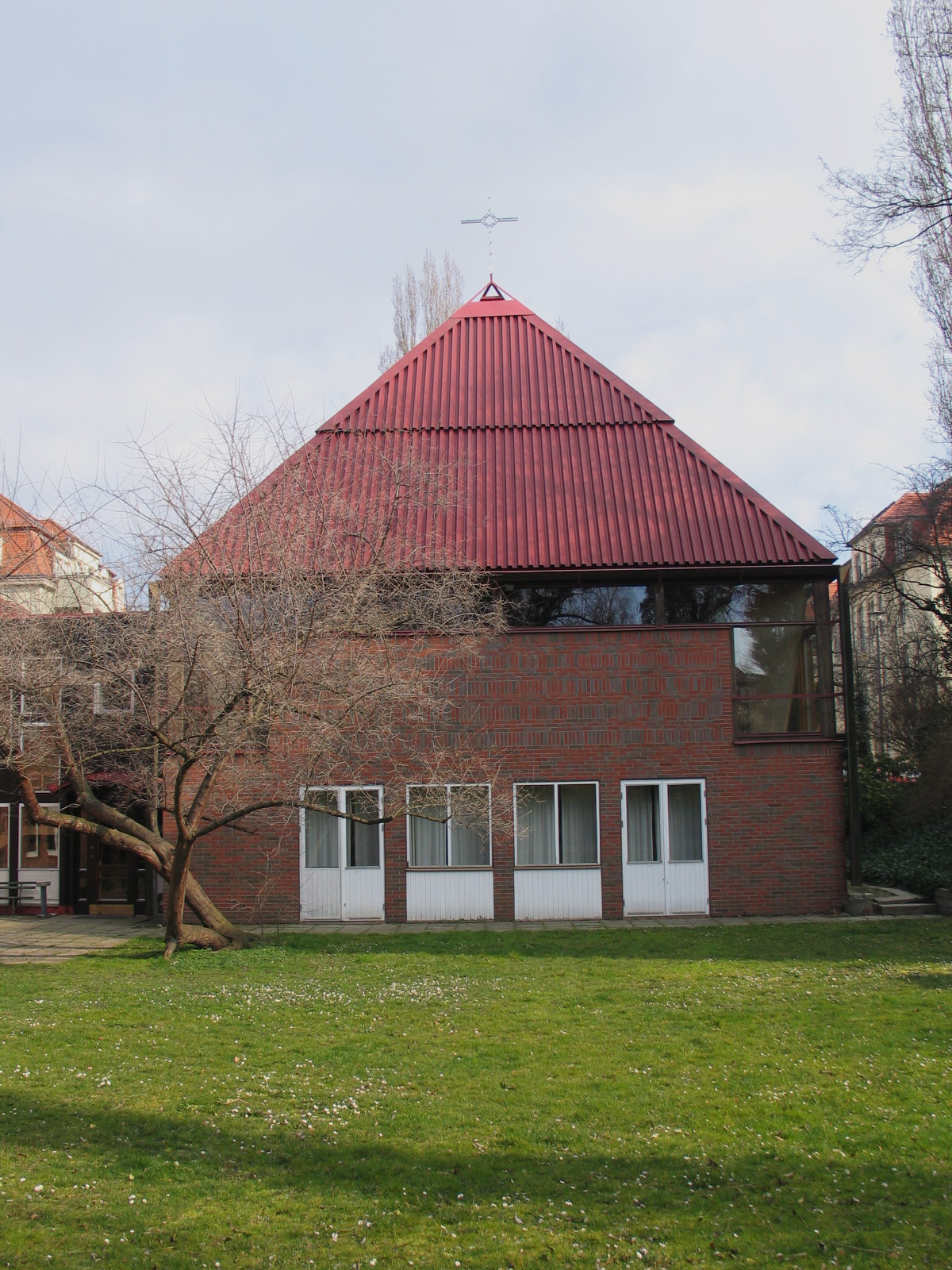 Neue Zionskirche auf der Bayreuther Straße in der Dresdner Südvorstadt, Ansicht von hinten